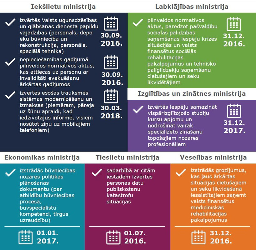 Infografiks.